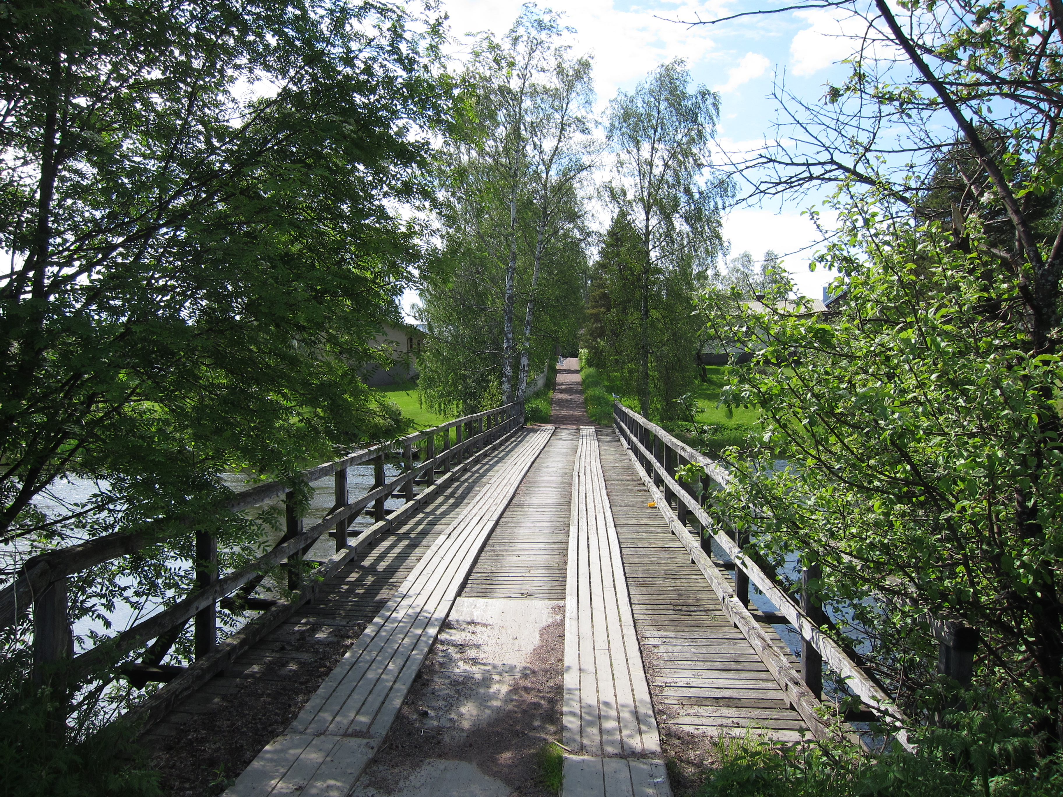 Silta Kotkan Pernoossa Kymijoen Mikkolansaareen.